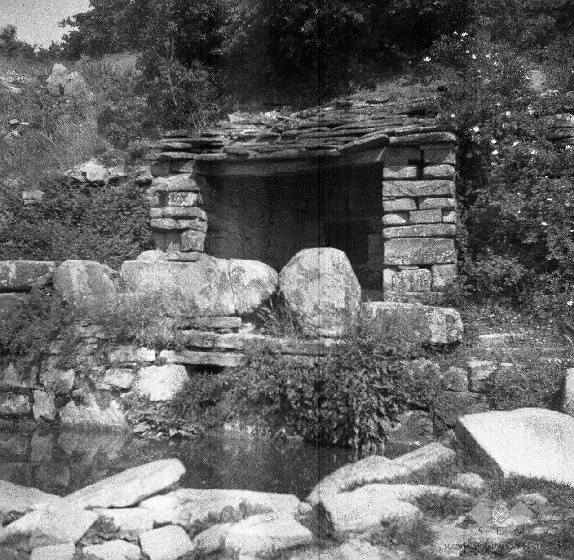 Studenec "Brače" pri Brečih (Puče).